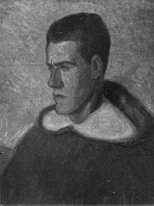 El novicio.